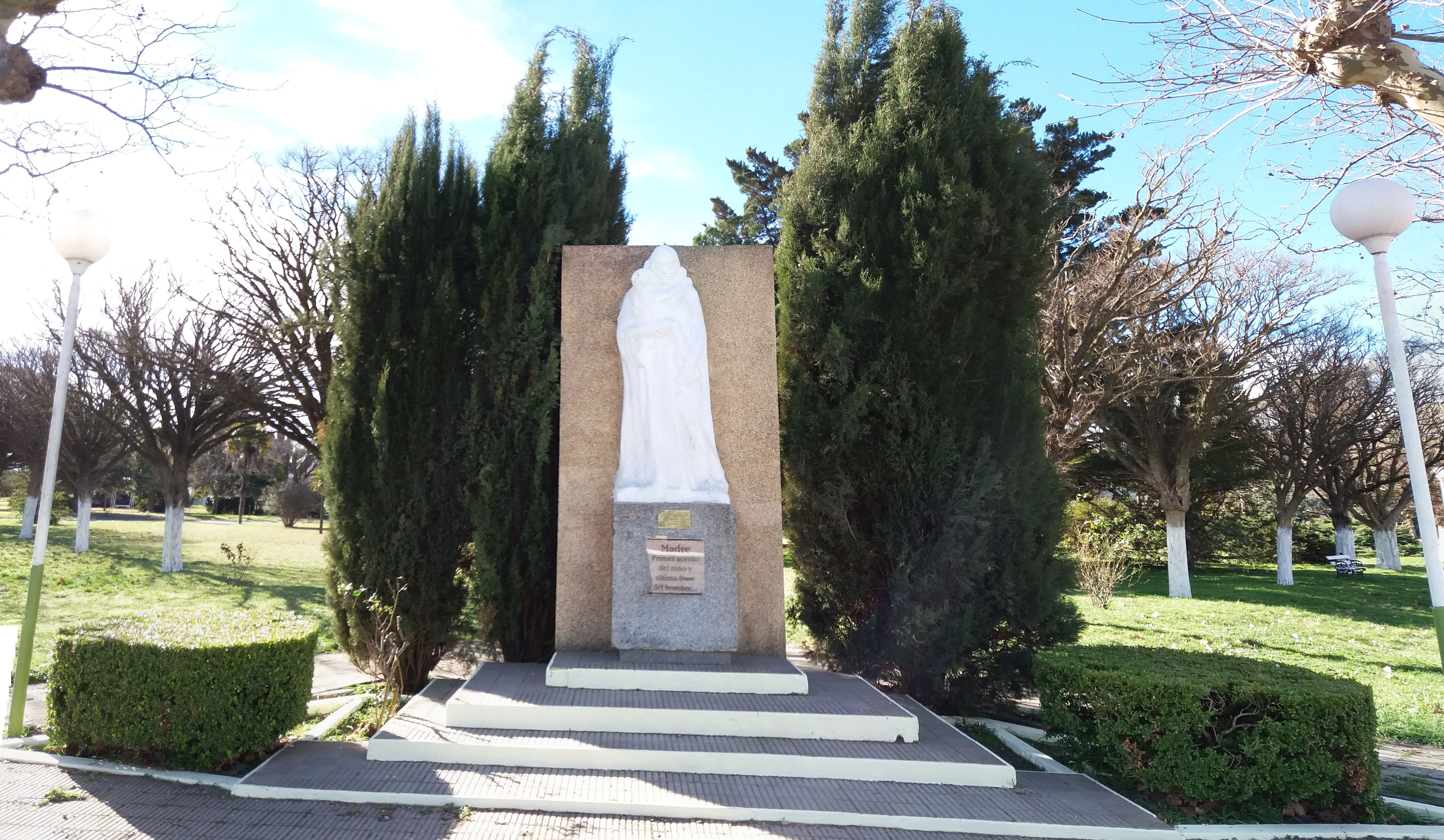 Monumento en homenaje a la Madre, ubicada en la Plaza San Martín (Diecisiete de Agosto, Partido de Puan, Provincia de Buenos Aires)